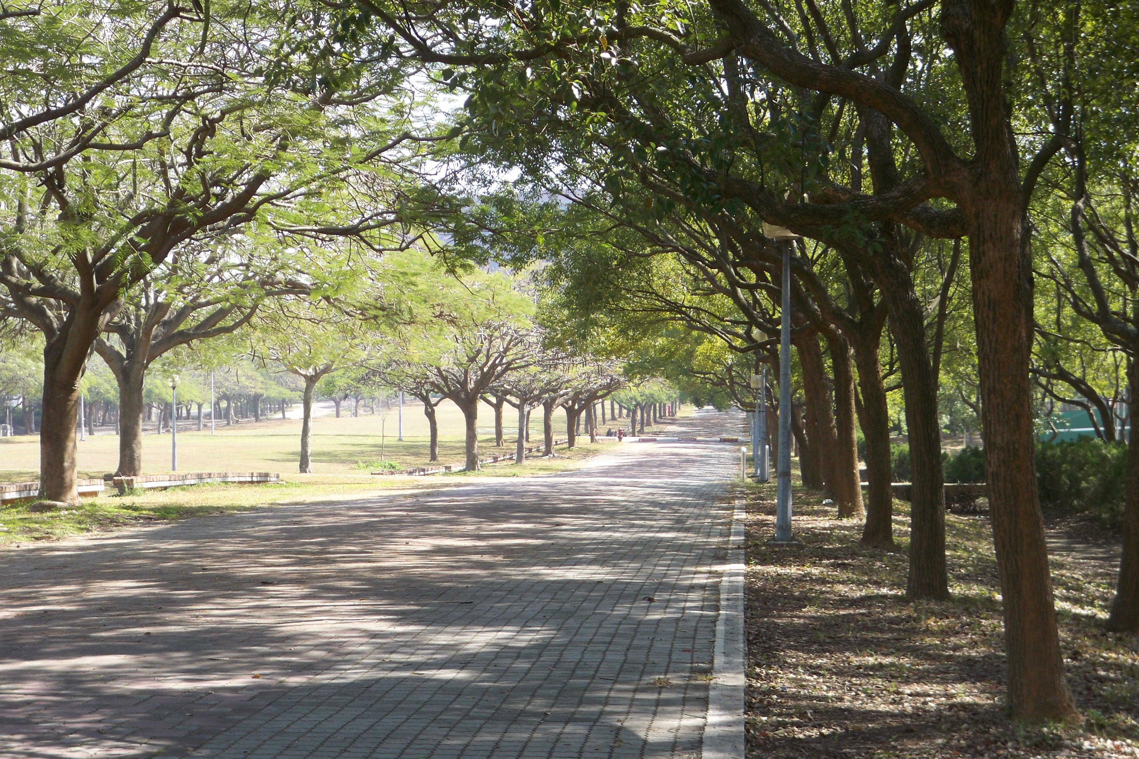 嘉義縣國立中正大學